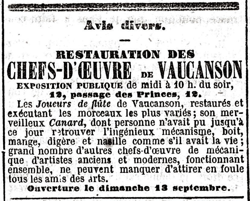 Advertisement in Le Temps